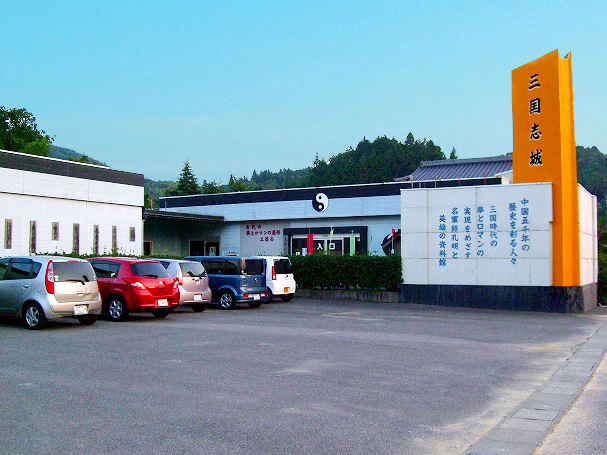 三国志城博物館